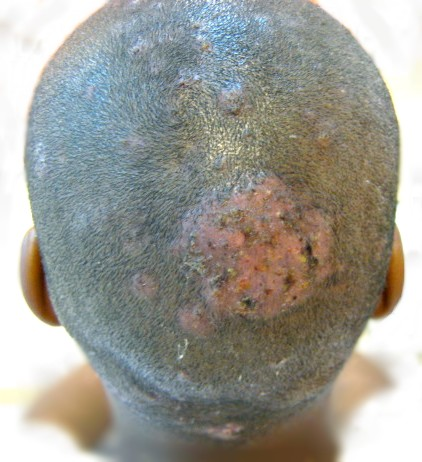 Kérion de Celse ou teigne inflammatoire et suppurative - ici une forme modérément inflammatoire et non suppurative